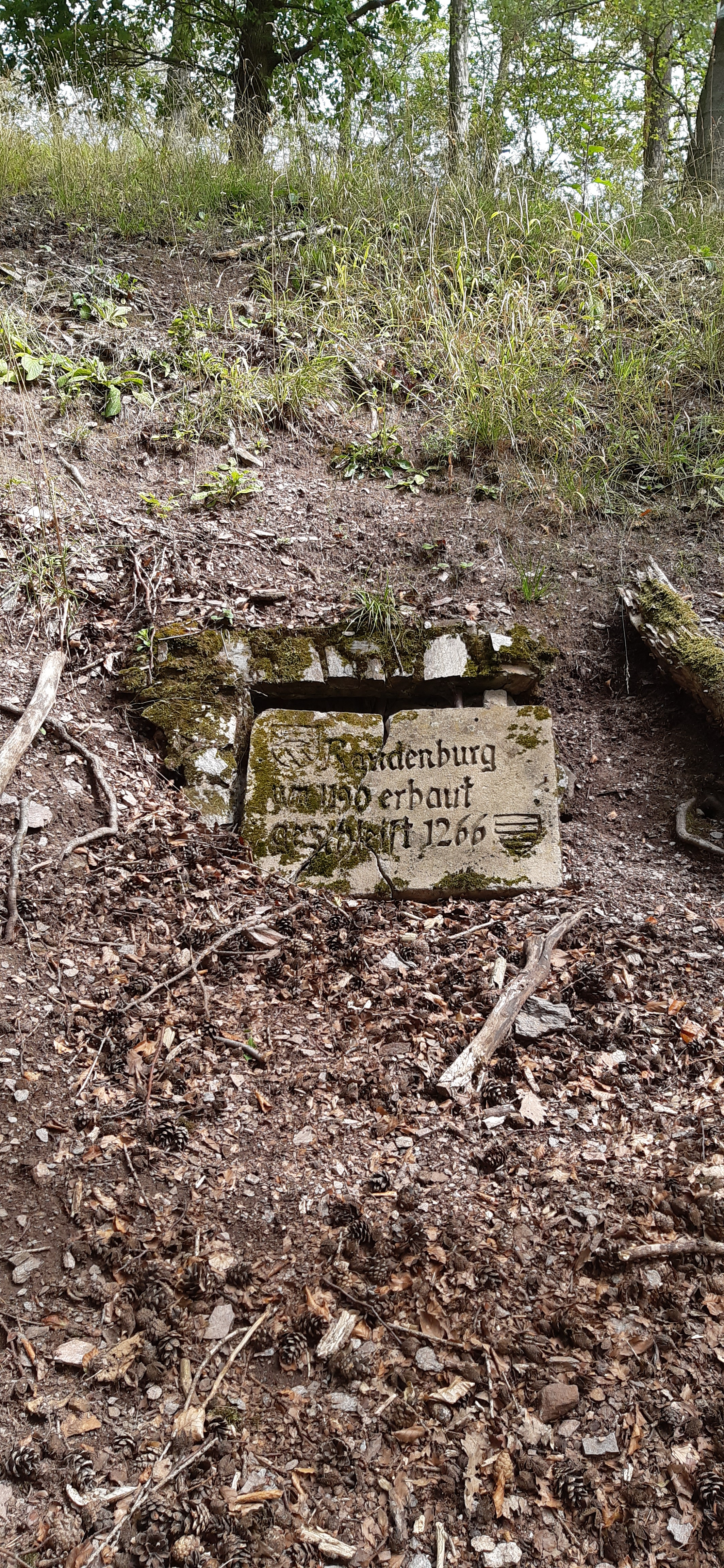 Rannenburg: Sporn-Südseite, Hauptburg. Rannenburg-Tafel vor Gewölbe. Blick nach Norden